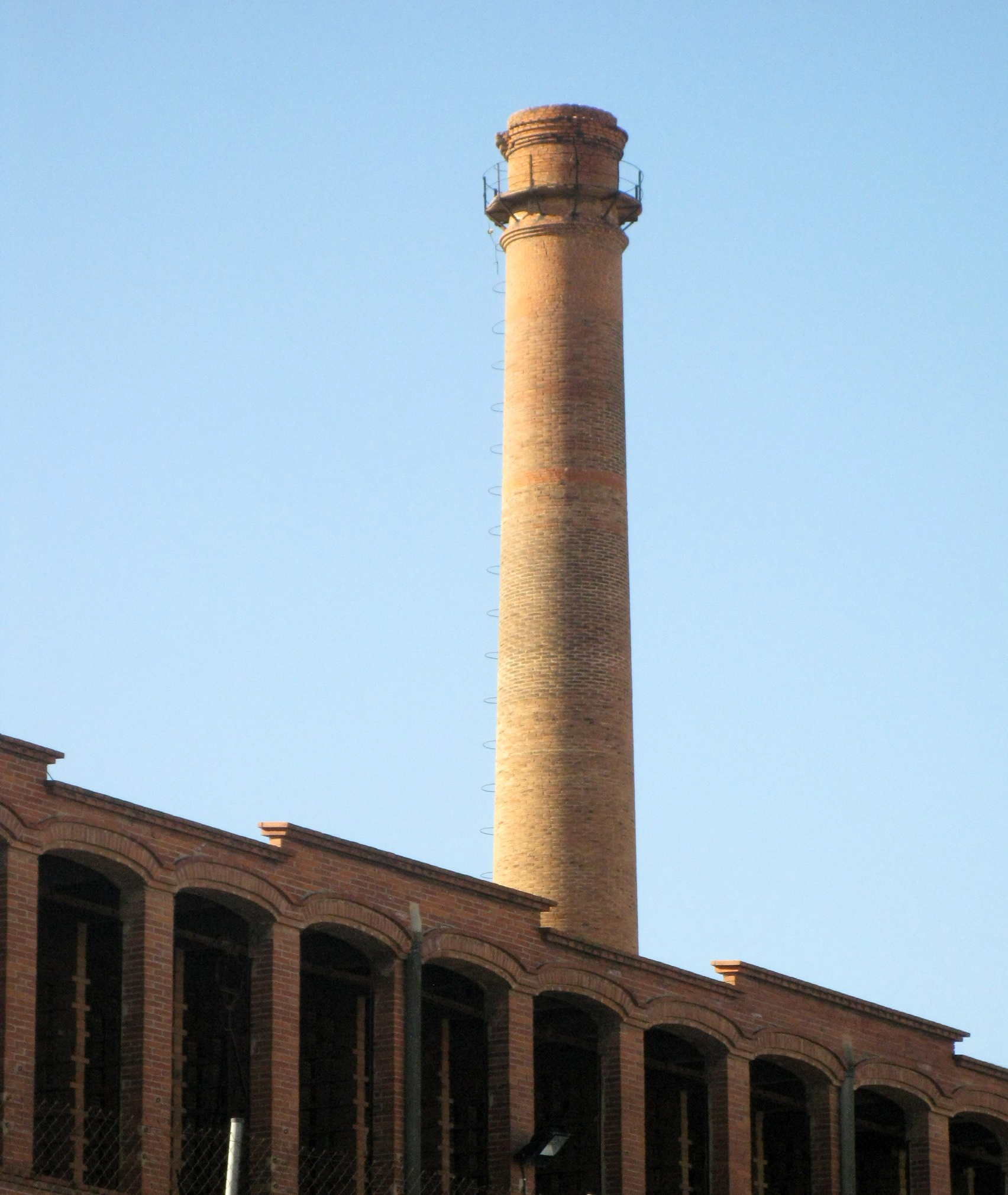 Bòbila Almirall II (Terrassa)